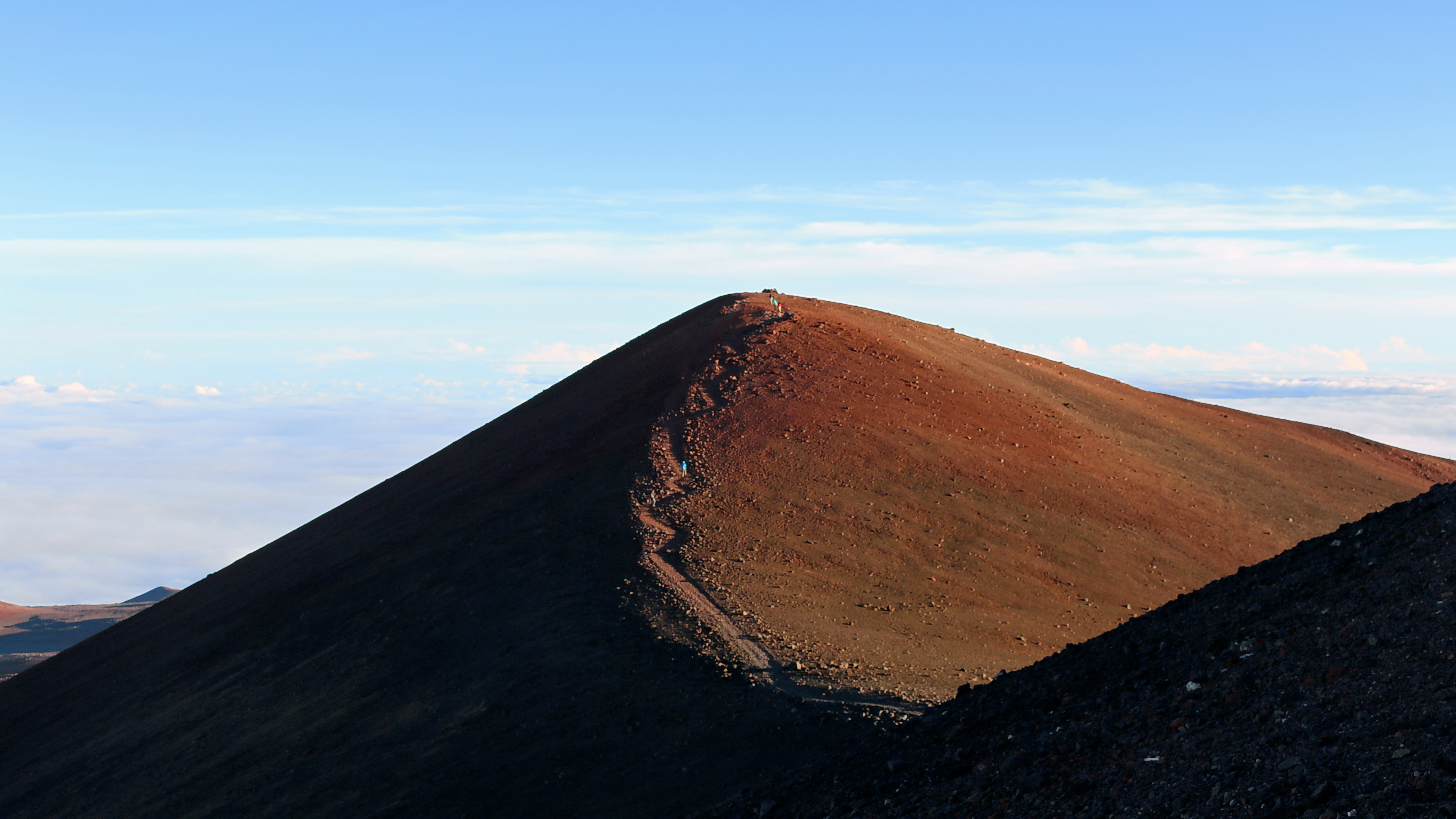 Mauna Kea Summit Trail, Mauna Kea, Big Island, Hawaii, United States